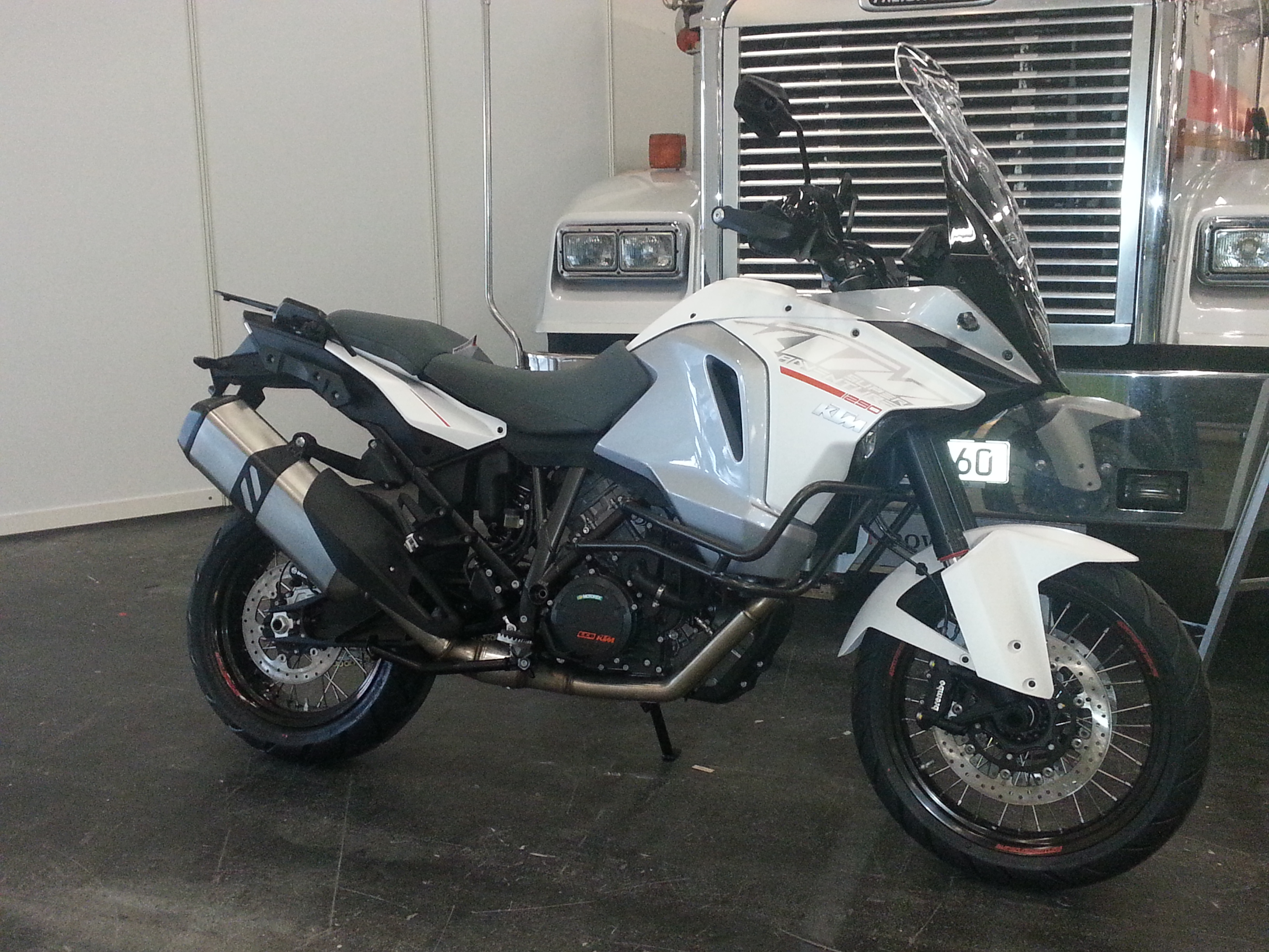 KTM 1290 Super Adventure Hamburger Motorradtage HMT 2015